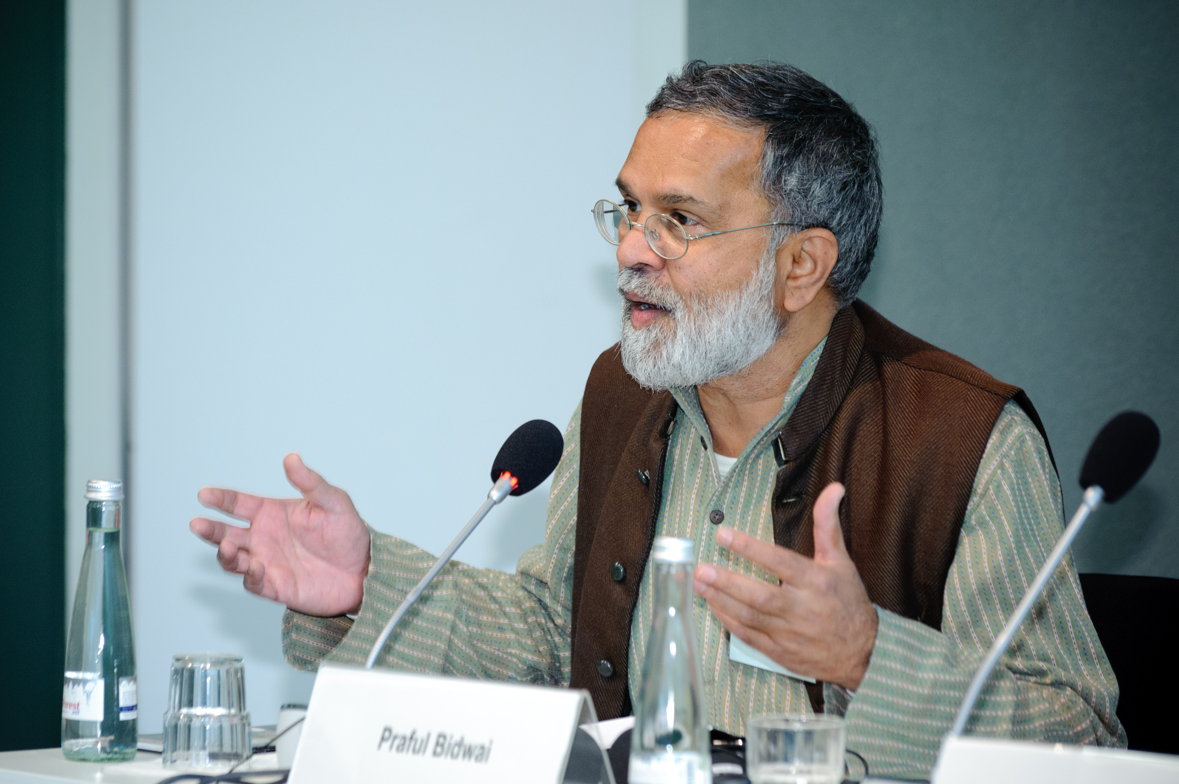 Praful Bidwai (Journalist, Aktivist, Indien) Foto: Stephan Röhl